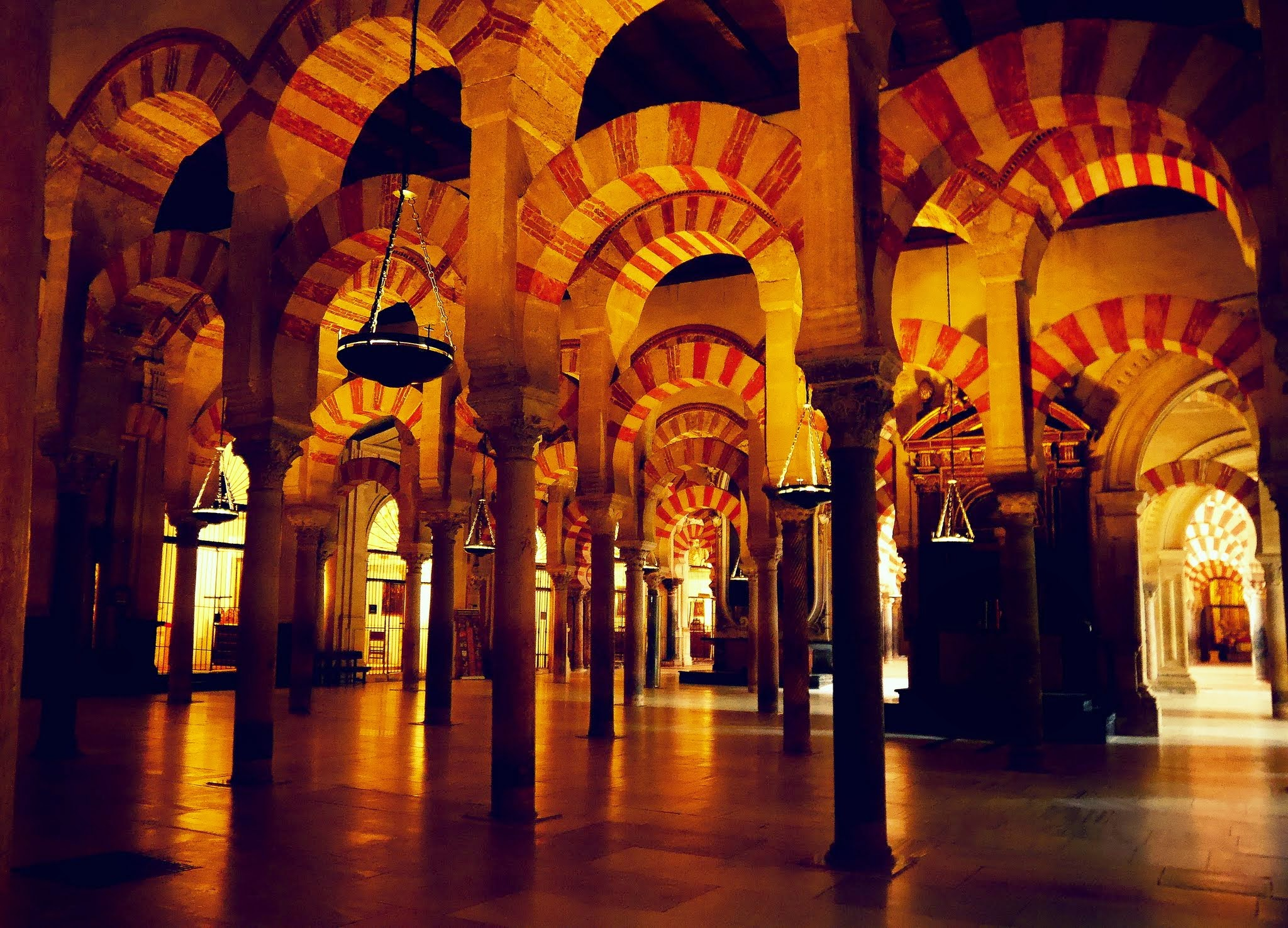 Moschee mit Rundbögen und Lampen